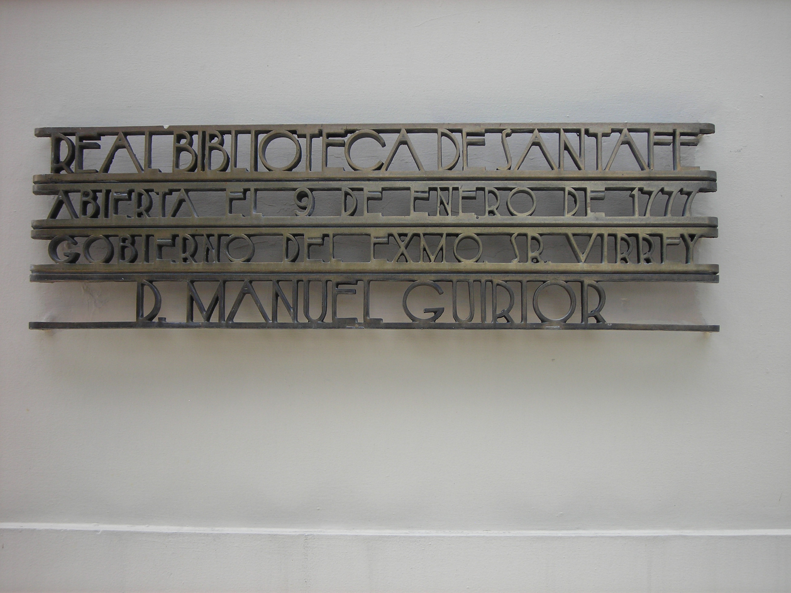 Placa en la entrada de la Biblioteca Nacional de Colombia en Bogotá. Diseñada por Sergio Trujillo Magnenat